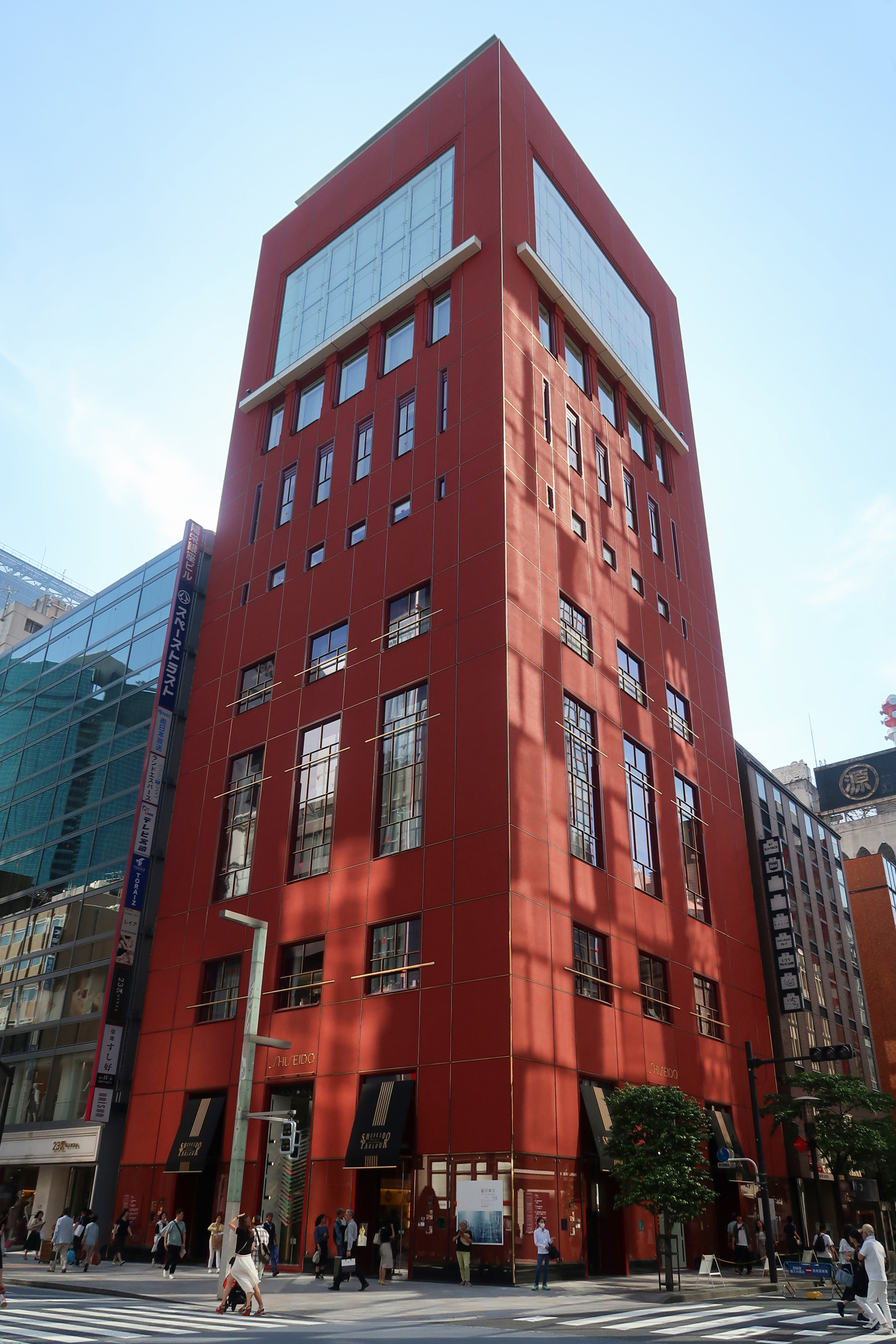 Shiseido Parlor Ginza